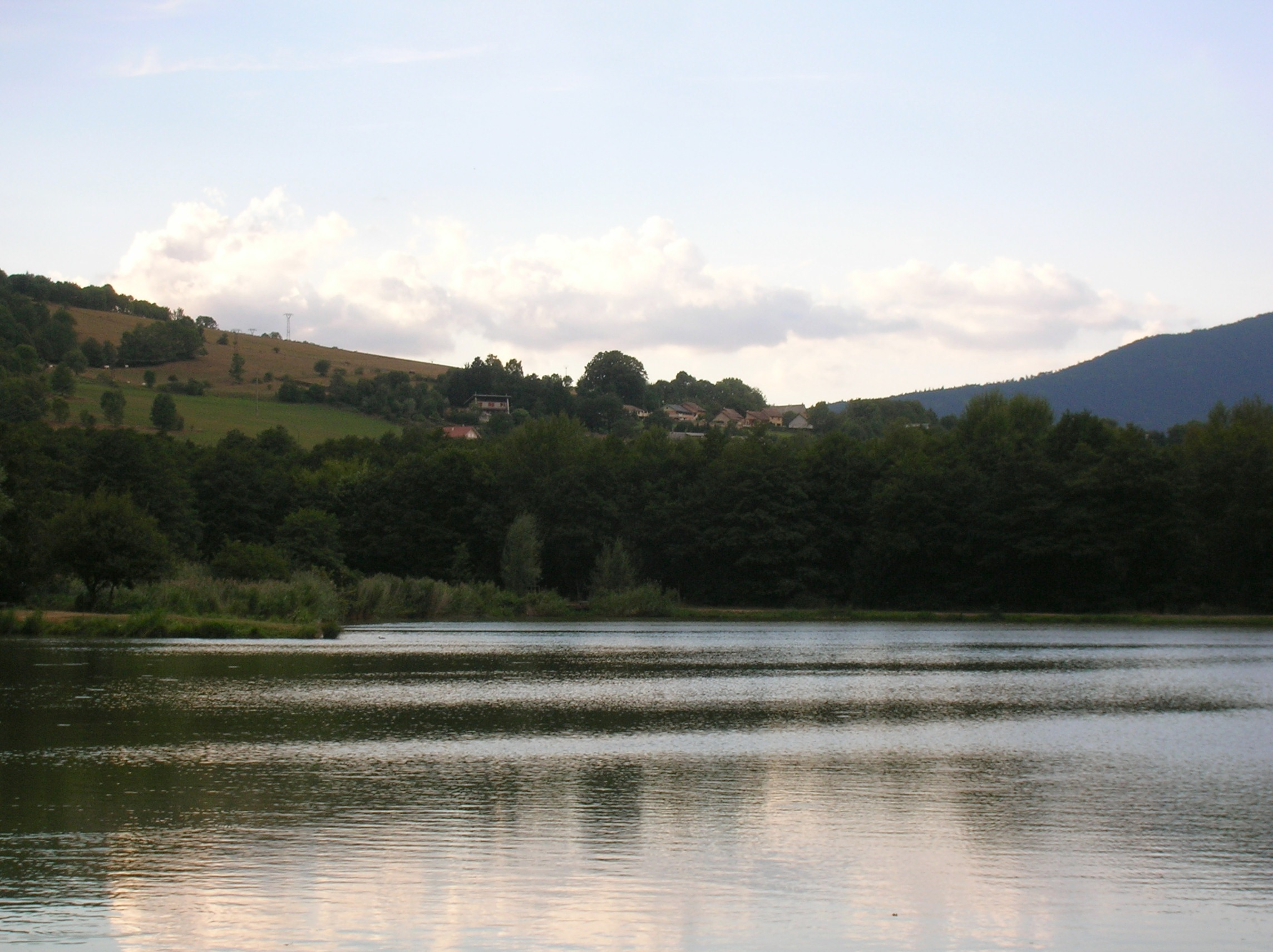 Etang du Crey, Susville, Isère, AuRA, France.